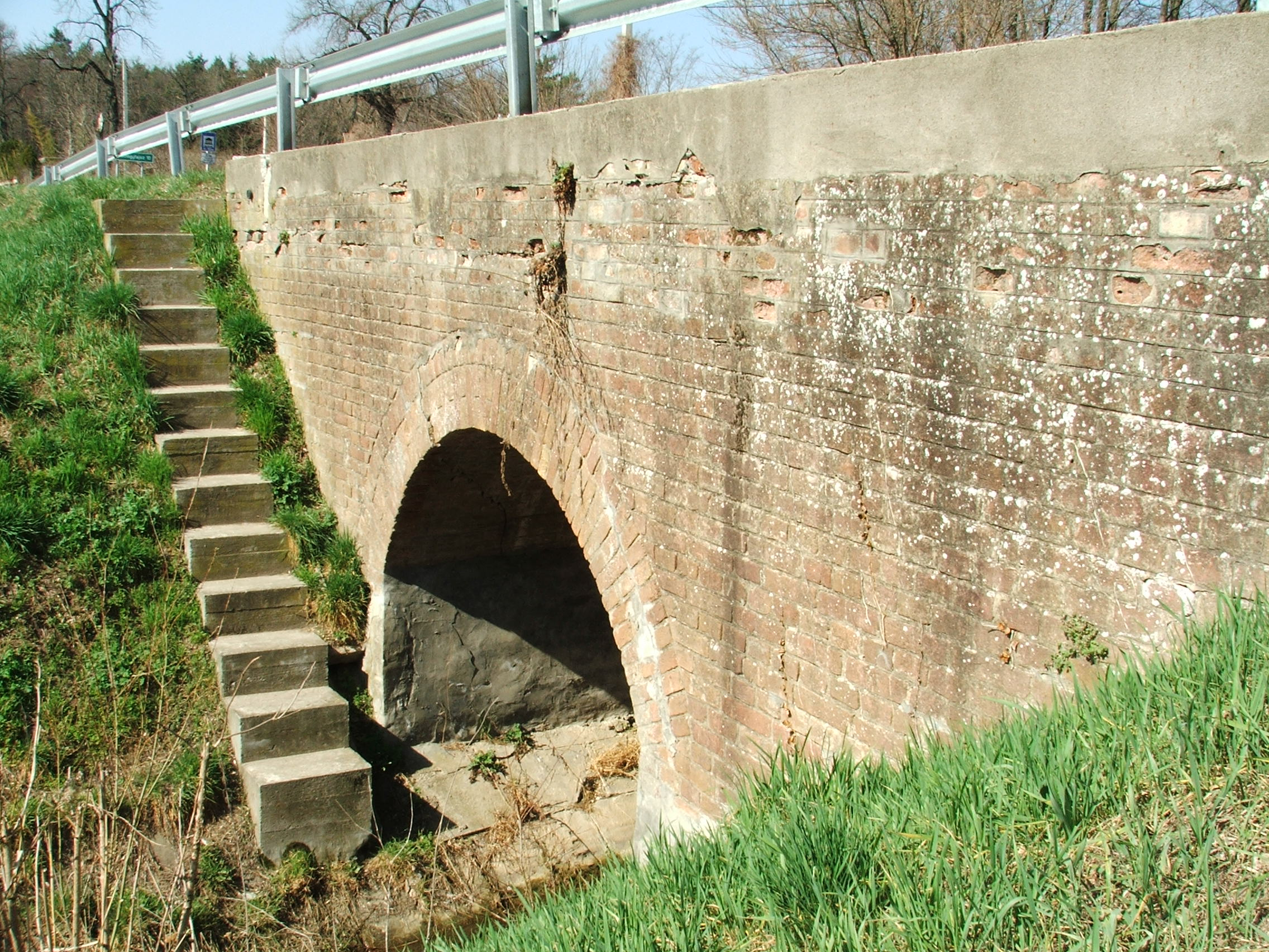 egylyukú boltozott híd a Medvogya-patakon (Öreglak - Marcali összekötőút 7+360 km szelvénye) This is a photo of a monument in Hungary. Identifier: 8047